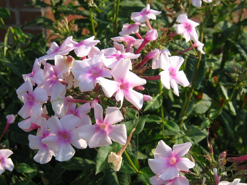 Rispige Flammenblume Phlox paniculata flav. Eva collum